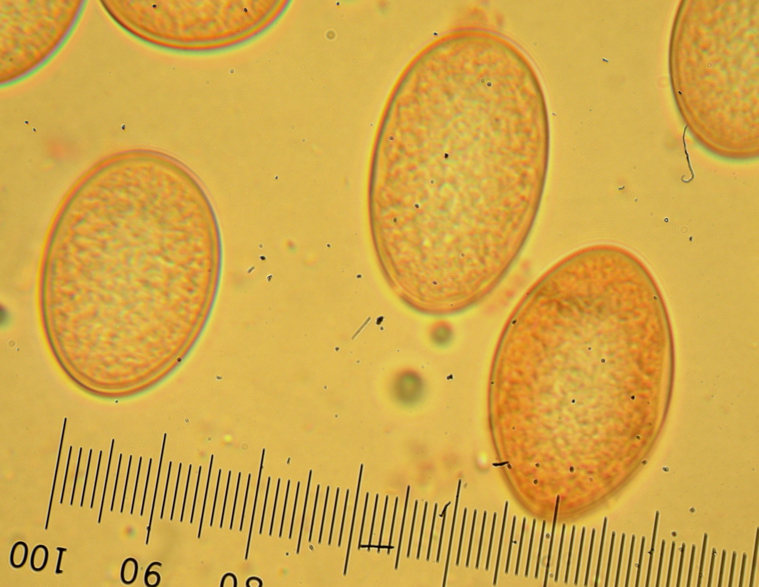 Morchella frustrata M.Kuo